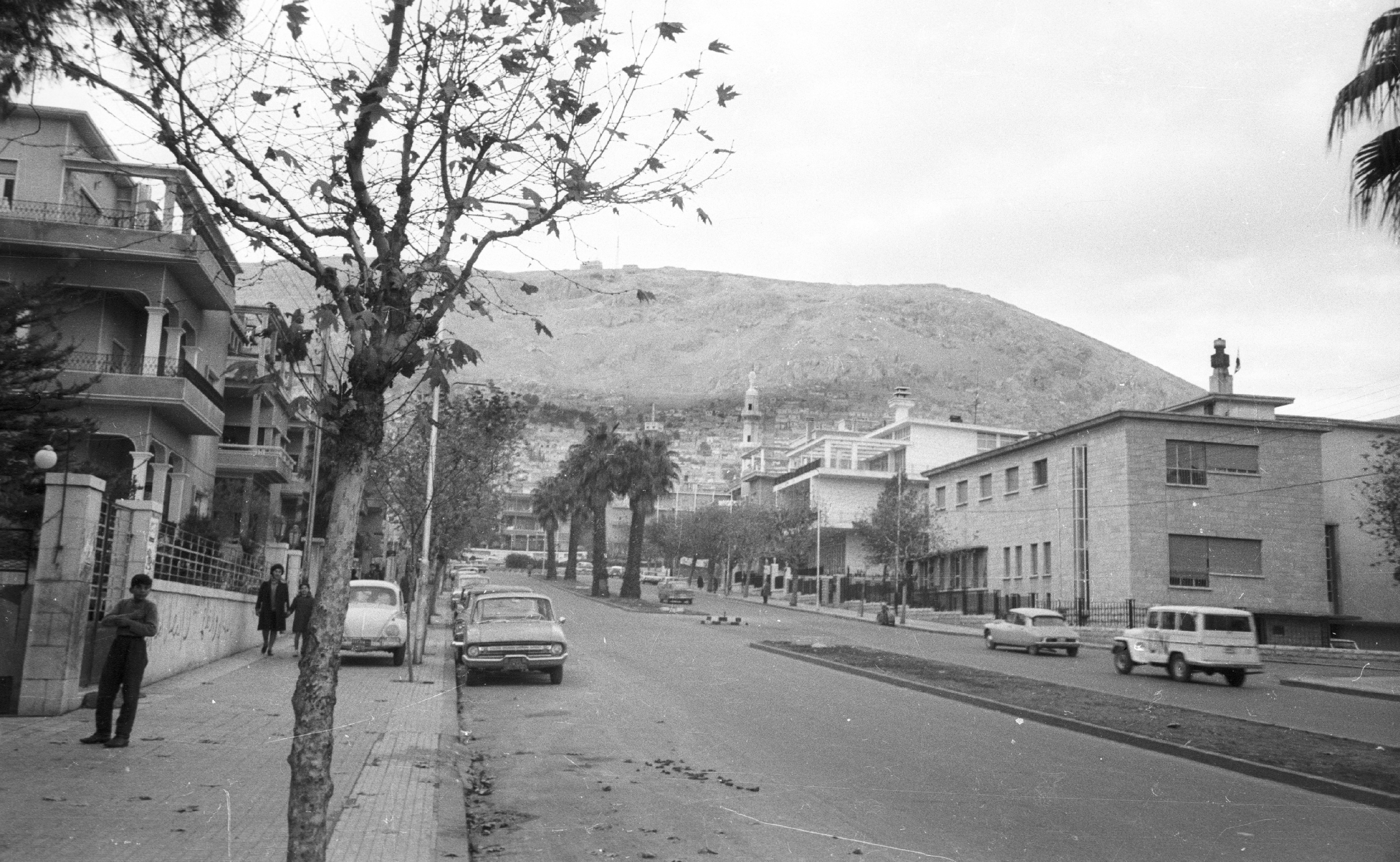 Al Jalaa sugárút, háttérben az Al Rawda mecset.